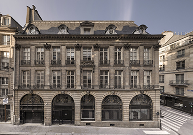 Deutsches Forum für Kunstgeschichte Paris, Hotel Lully © DFK Paris/Markus Schilder